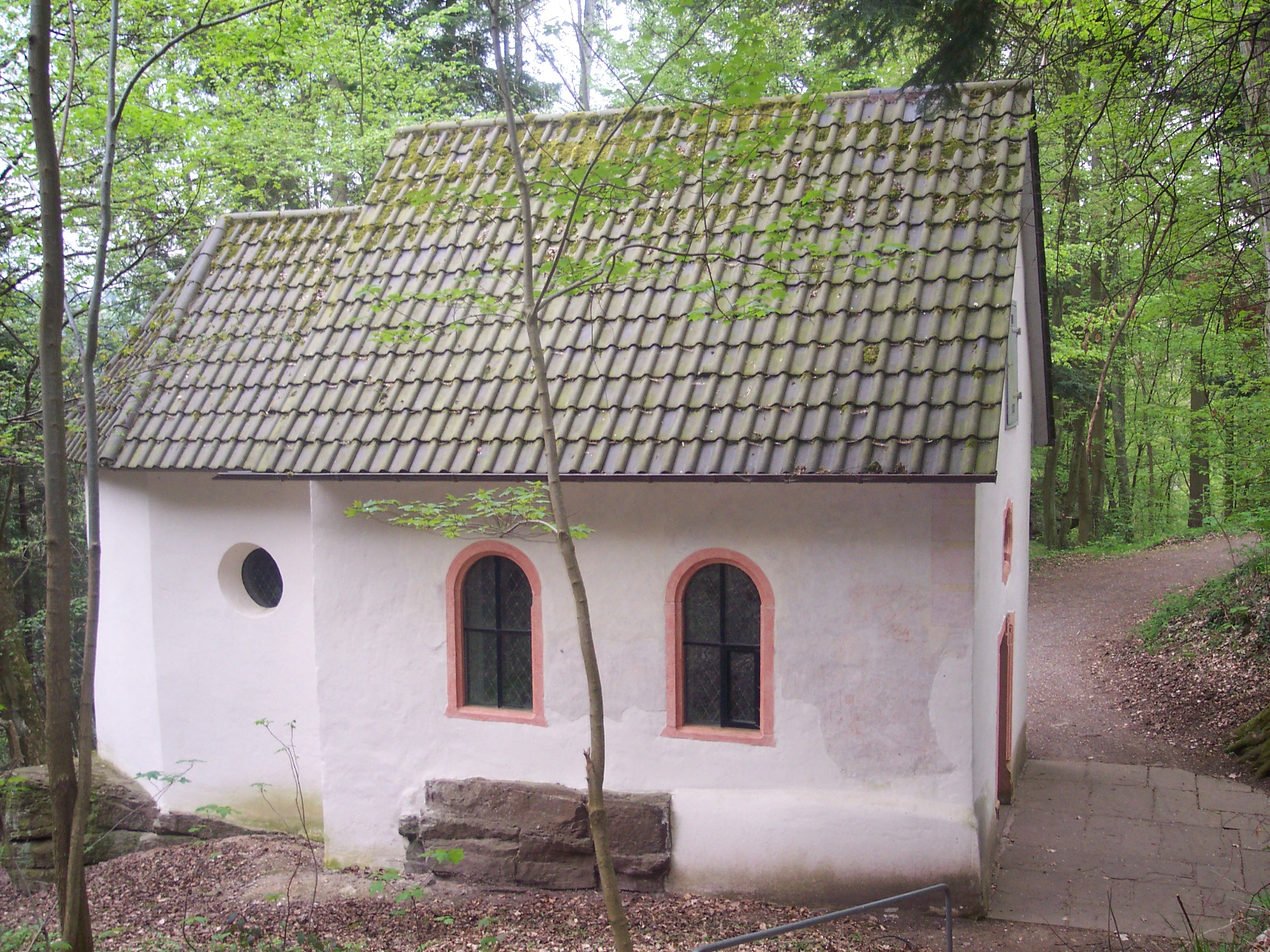 Auf dem Bild ist die Waldkapelle von Hamberg (Gemeinde Neuhausen im Enzkeis) zu sehen